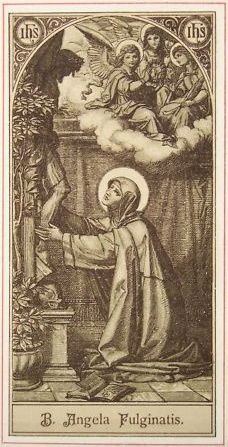 Selige Angela von Foligno